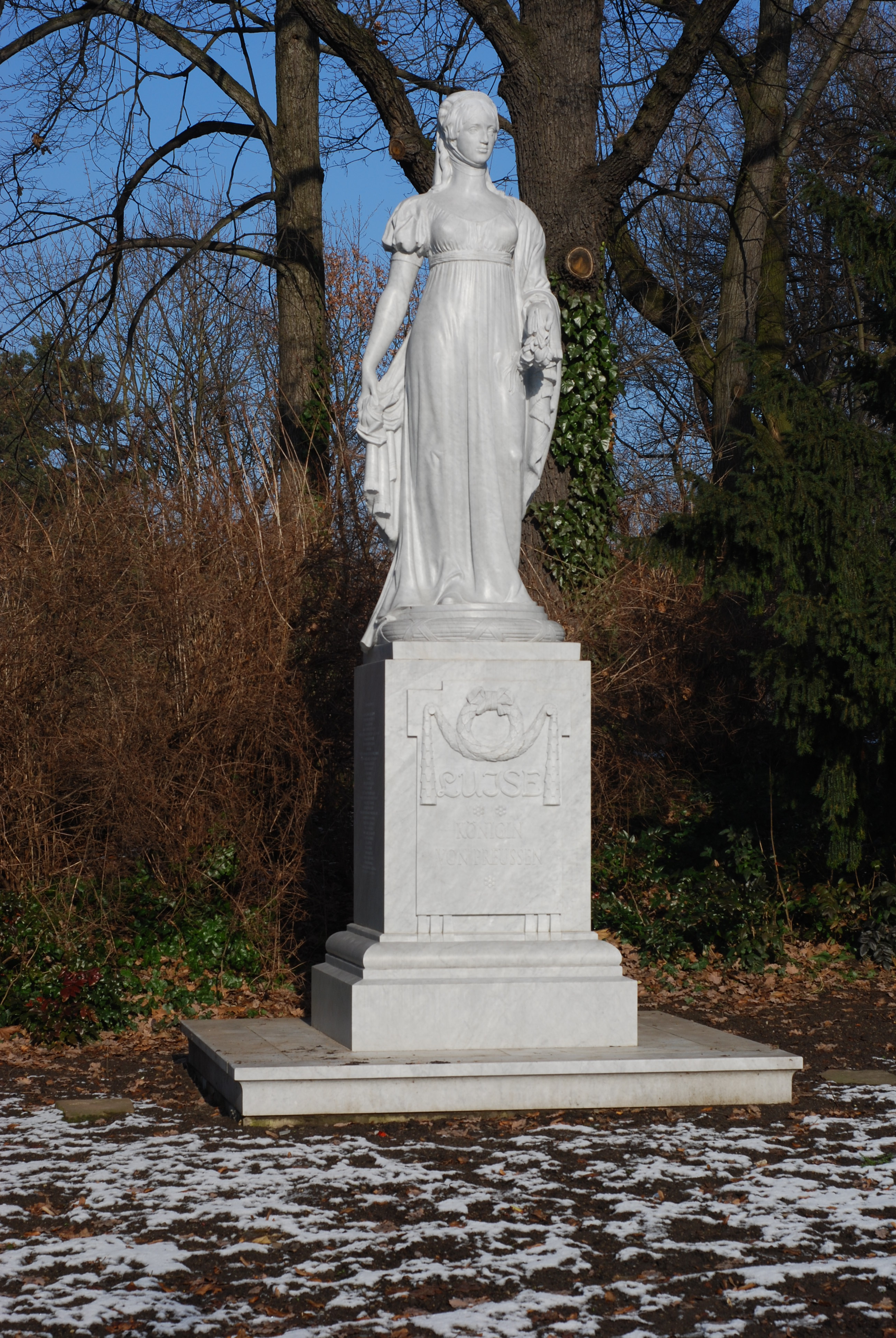 Denkmal der Königin Luise von Preussen in Magdeburg